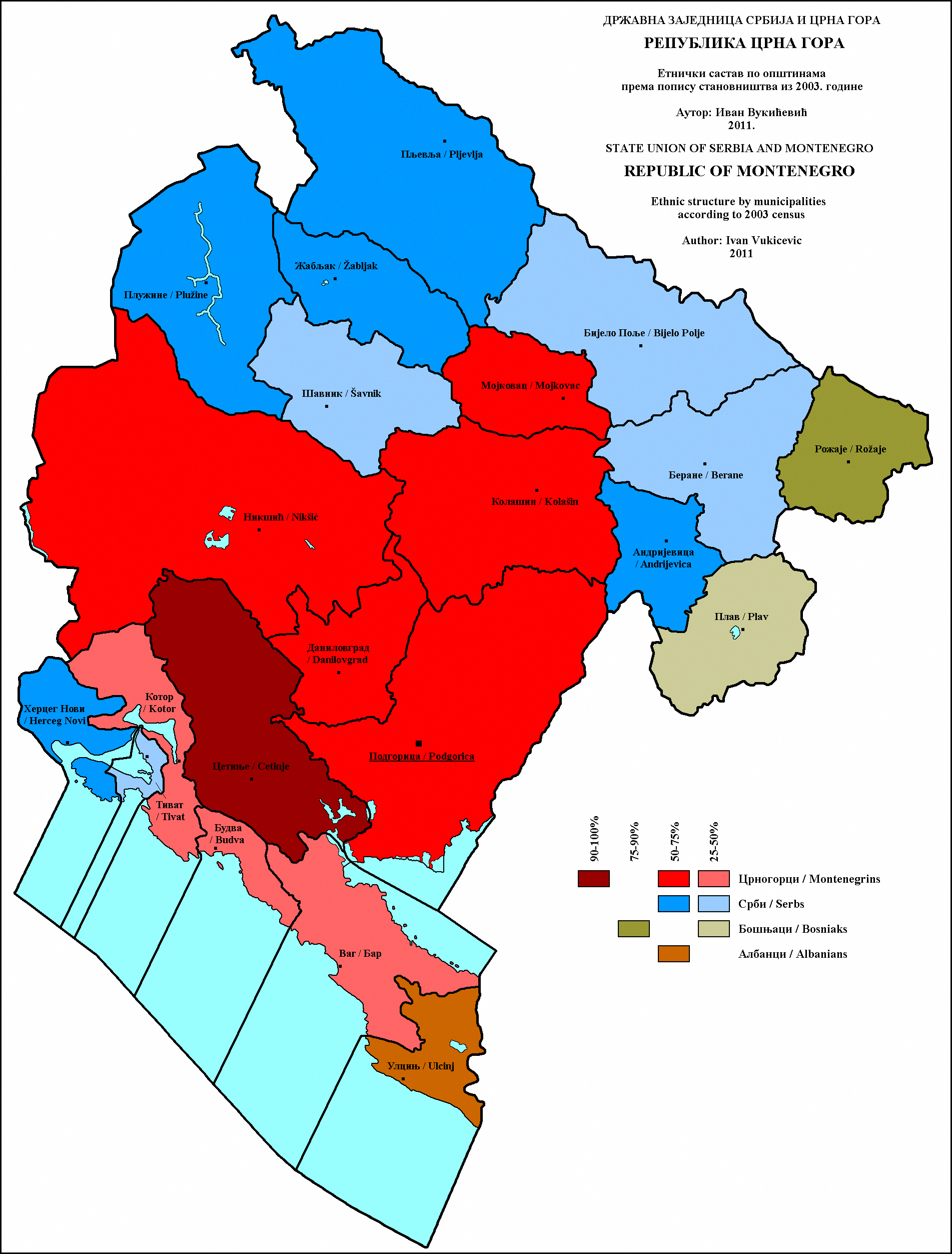 Етнички састав Црне Горе по општинама 2003. године. Аутор: Иван Вукићевић